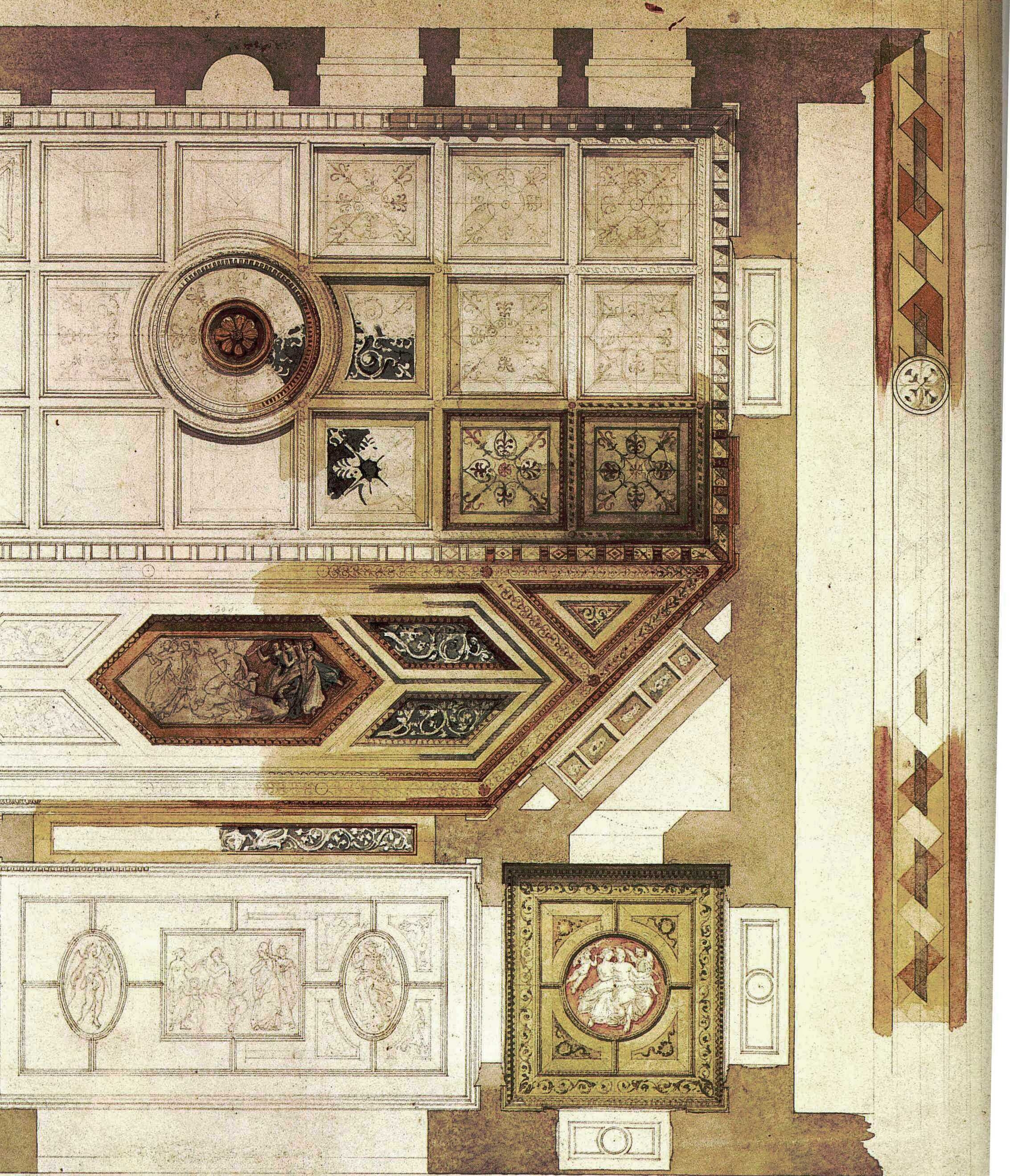 Dresden Palais Kaskel-Oppenheim, Speisesaal Entwurf für die Decke des Speisesaals gezeichnet von Gottfried Semper